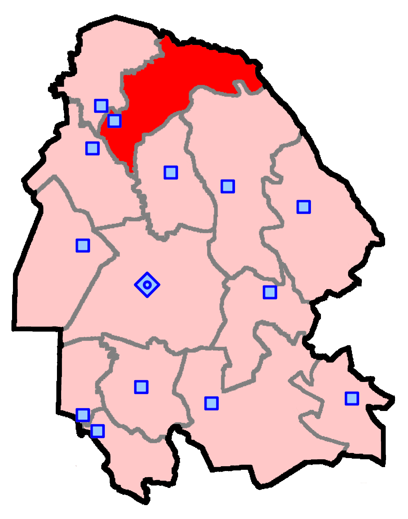 حوزهٔ انتخاباتی دزفول برای انتخابات مجلس شورای اسلامی